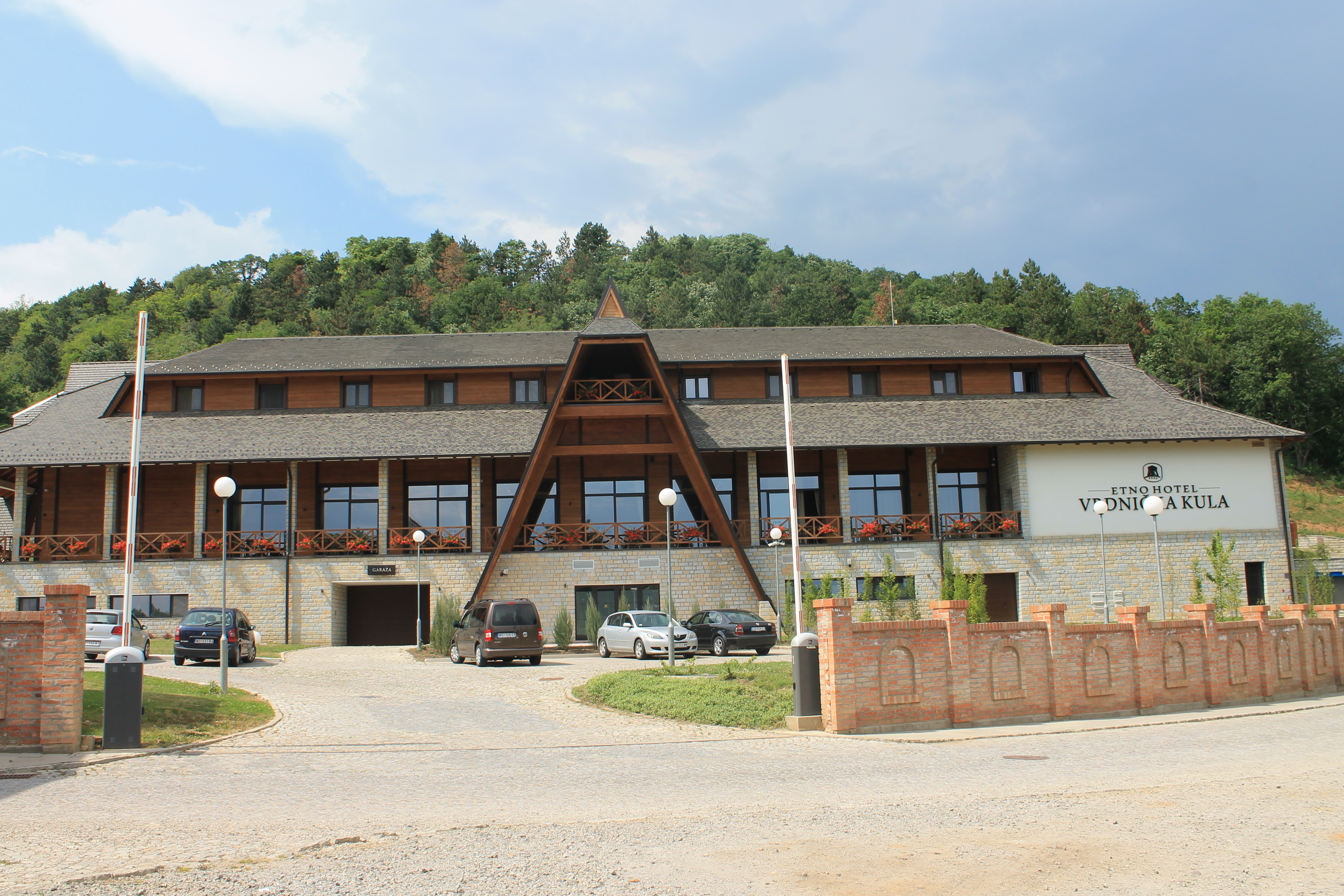 Etno naselje Vrdnička kula